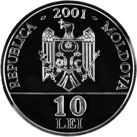 Аверс памятных монет "Лесной кот" и "Зелёный дятел"